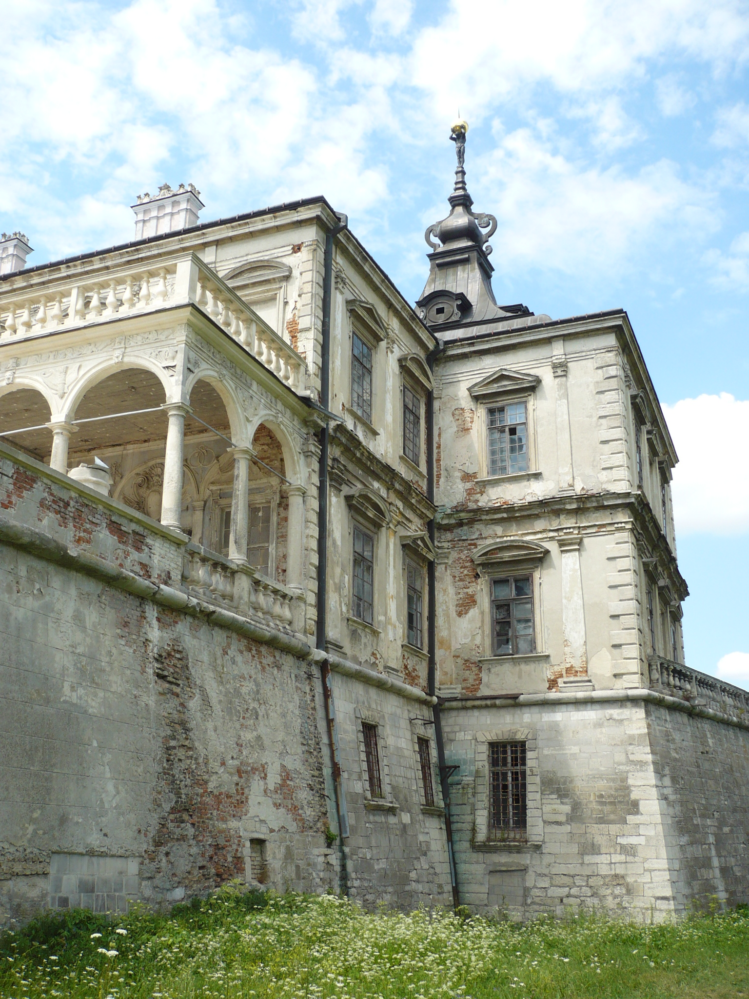 Pałac w Podhorcach, balkon, 2012 r.